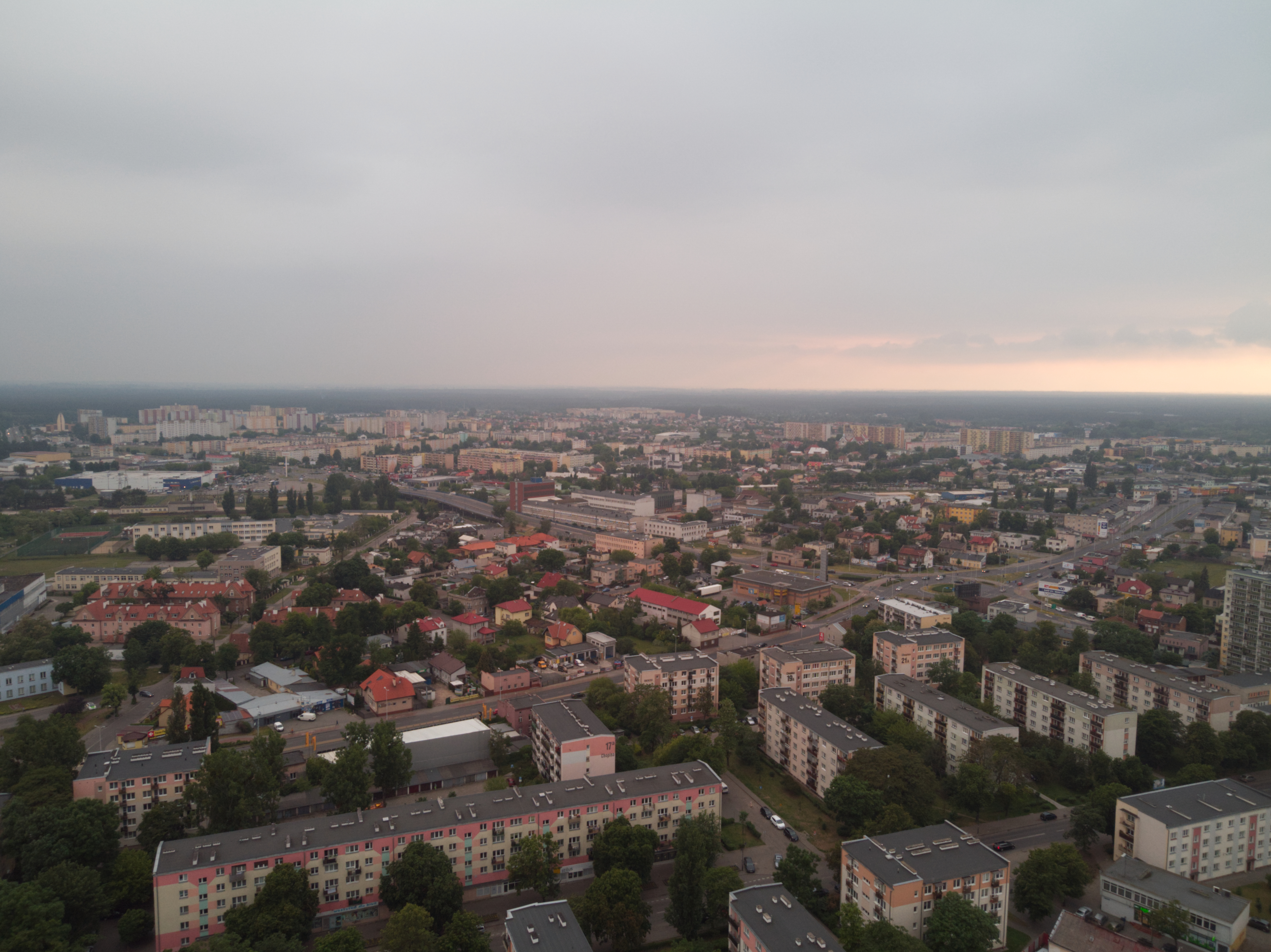 Styk Śródmieścia i Południa (2020 r.)